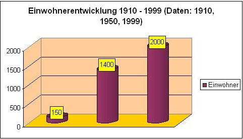 Autor: Selbst gemacht mit Excel Zeigt die Einwohnerentwicklung Neusorgs.